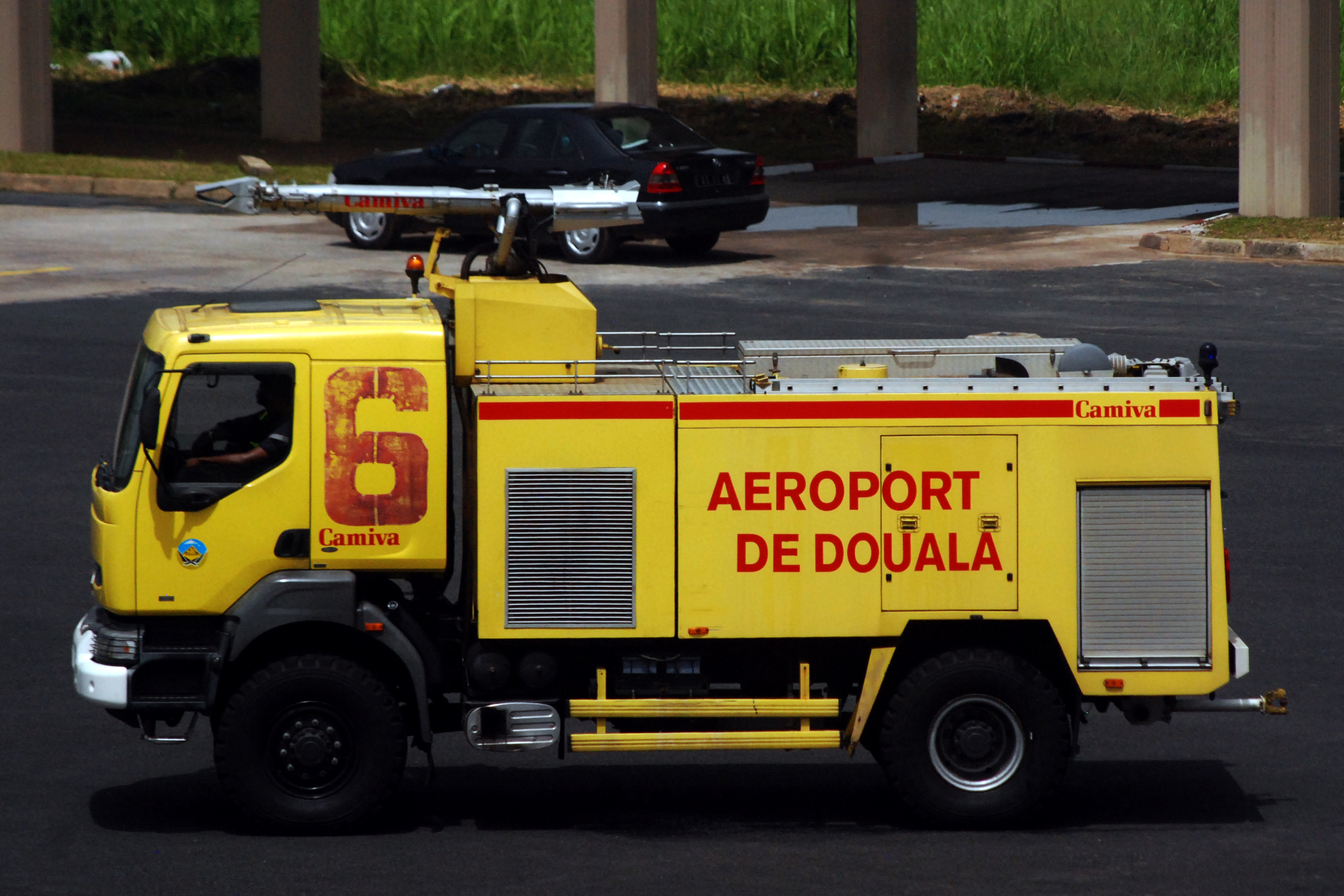 véhicule des sapeurs pompiers de l’aéroport de Douala au Cameroun. This is an image with the theme "Africa on the Move or Transport" from: Cameroon